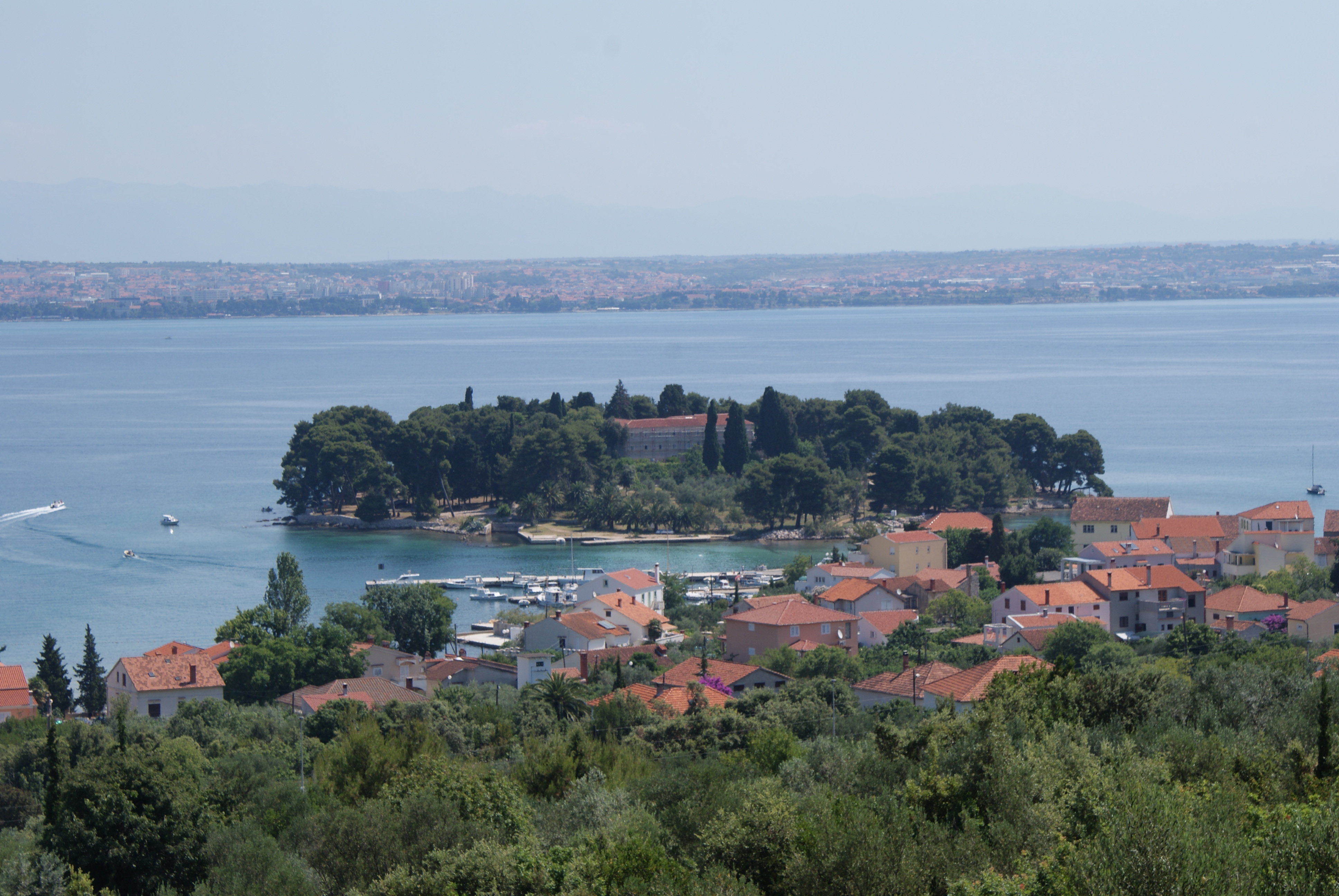 Blick über Preko auf der Insel Ugljan, in der Bildmitte das Inselchen Galovac, im Hintergrund Zadar